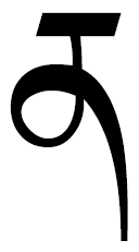 на тибетское